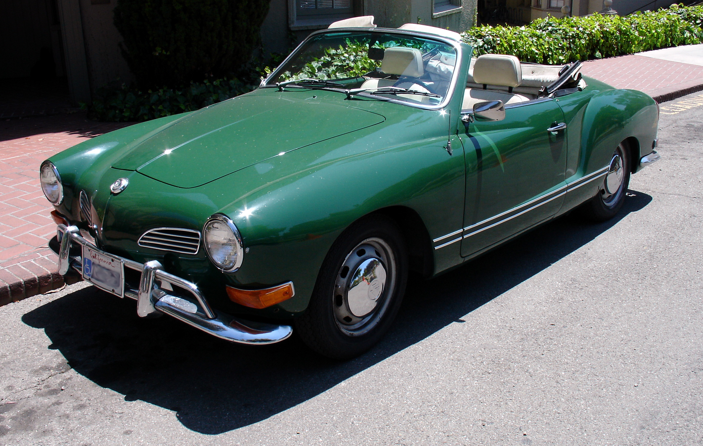 Volkswagen Karmann Ghia convertible